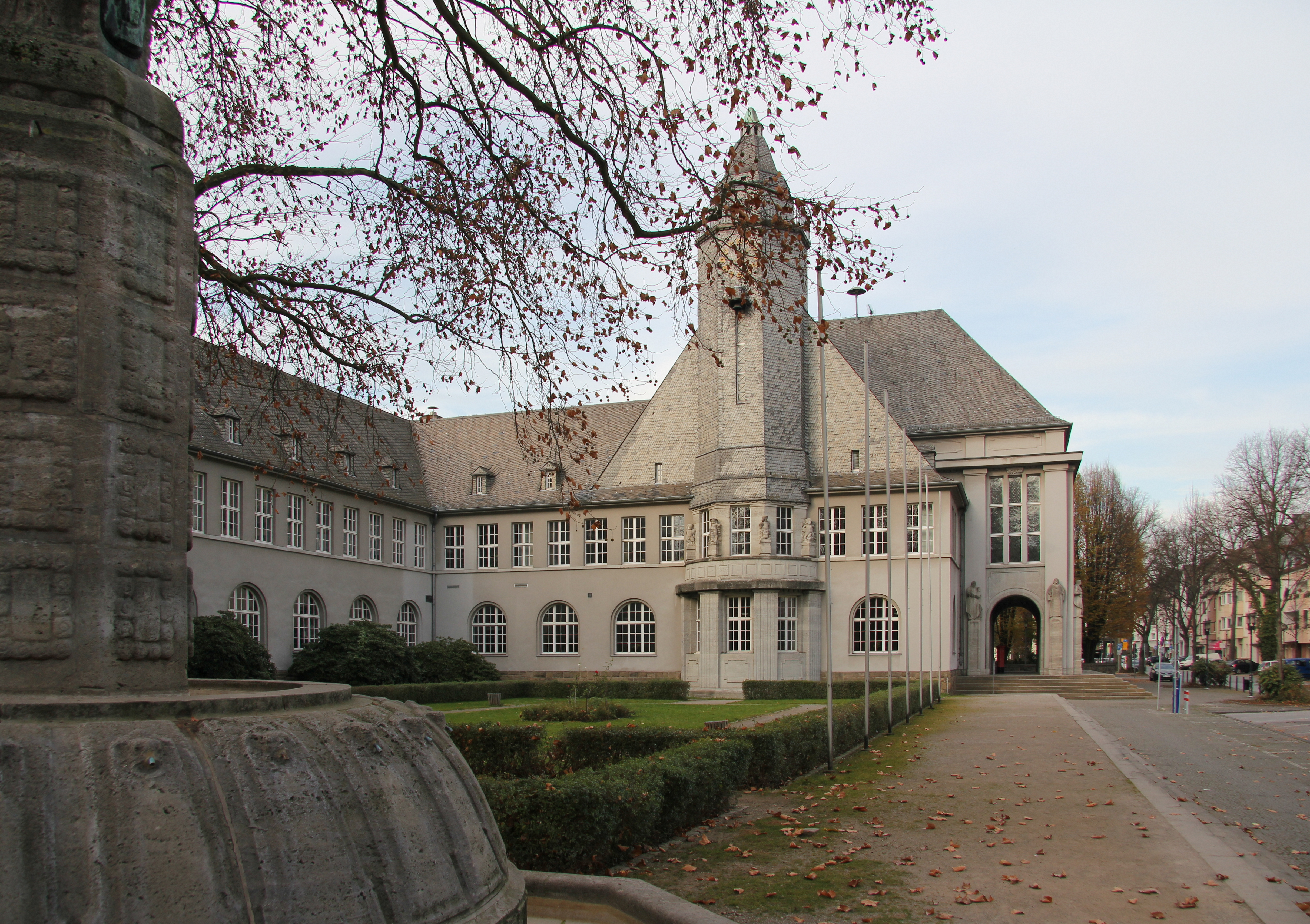 Schwerter Rathaus von 1914